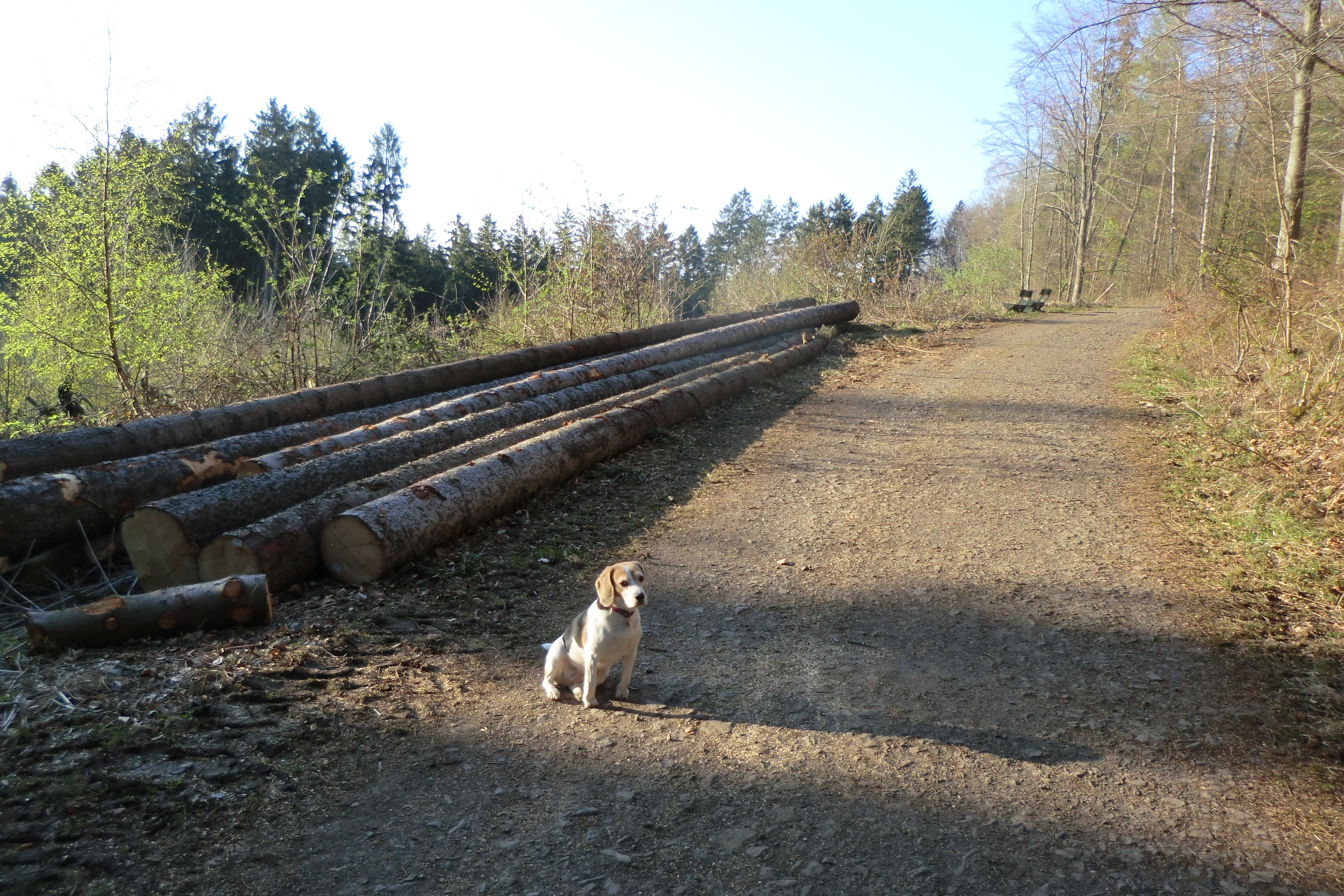 Gefälltes Holz am Reineberg